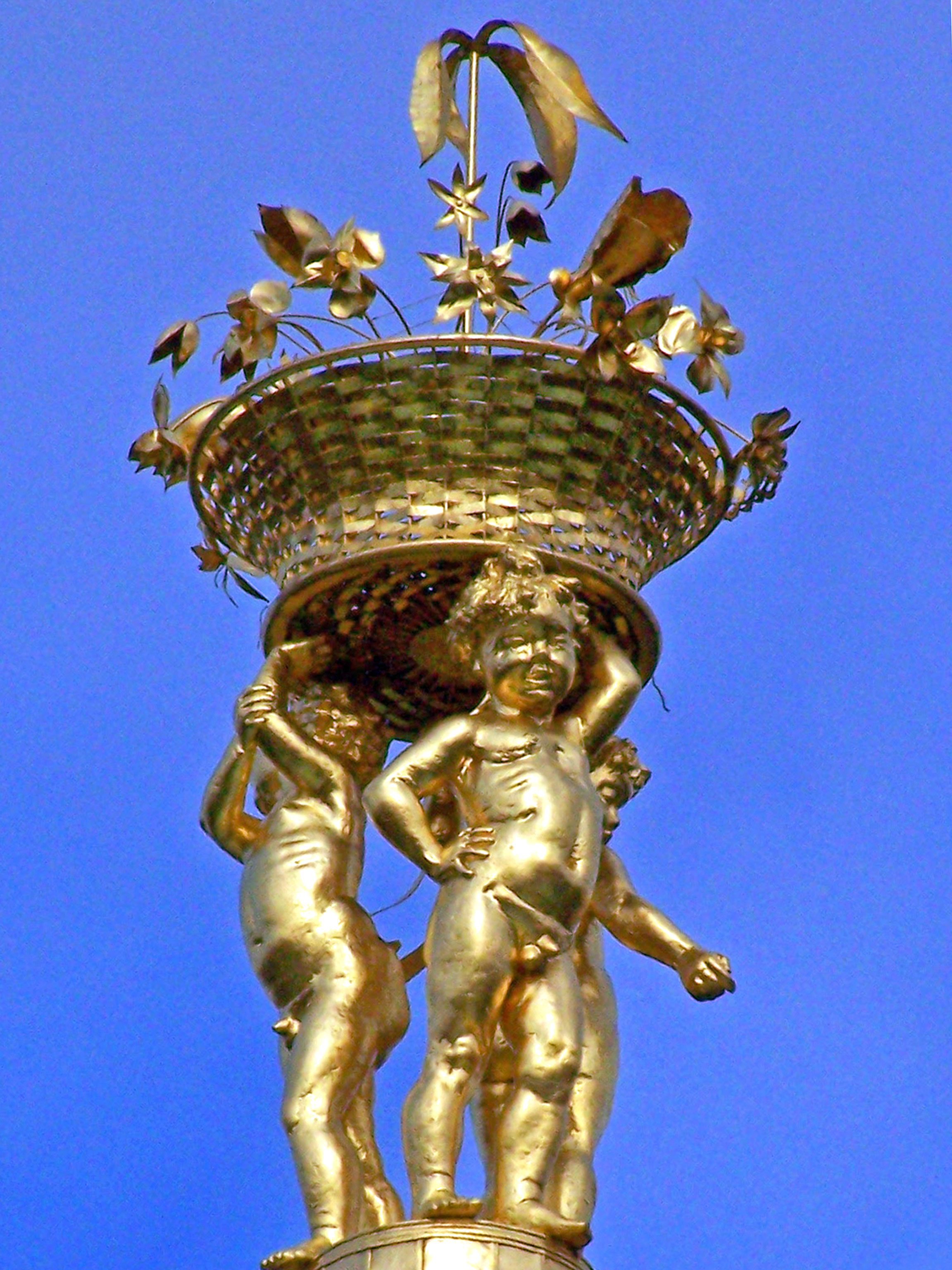 Figurengruppe auf dem Belvedere (Charlottenburg) von Karl Bobeck (1925–1992) nach Entwürfen von Johann Eckstein (1735–1817)